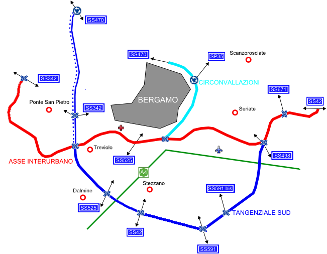 Mappa del sistema viario suburbano e extraurbano di Bergamo con i tratti in esercizio e quelli in progetto.